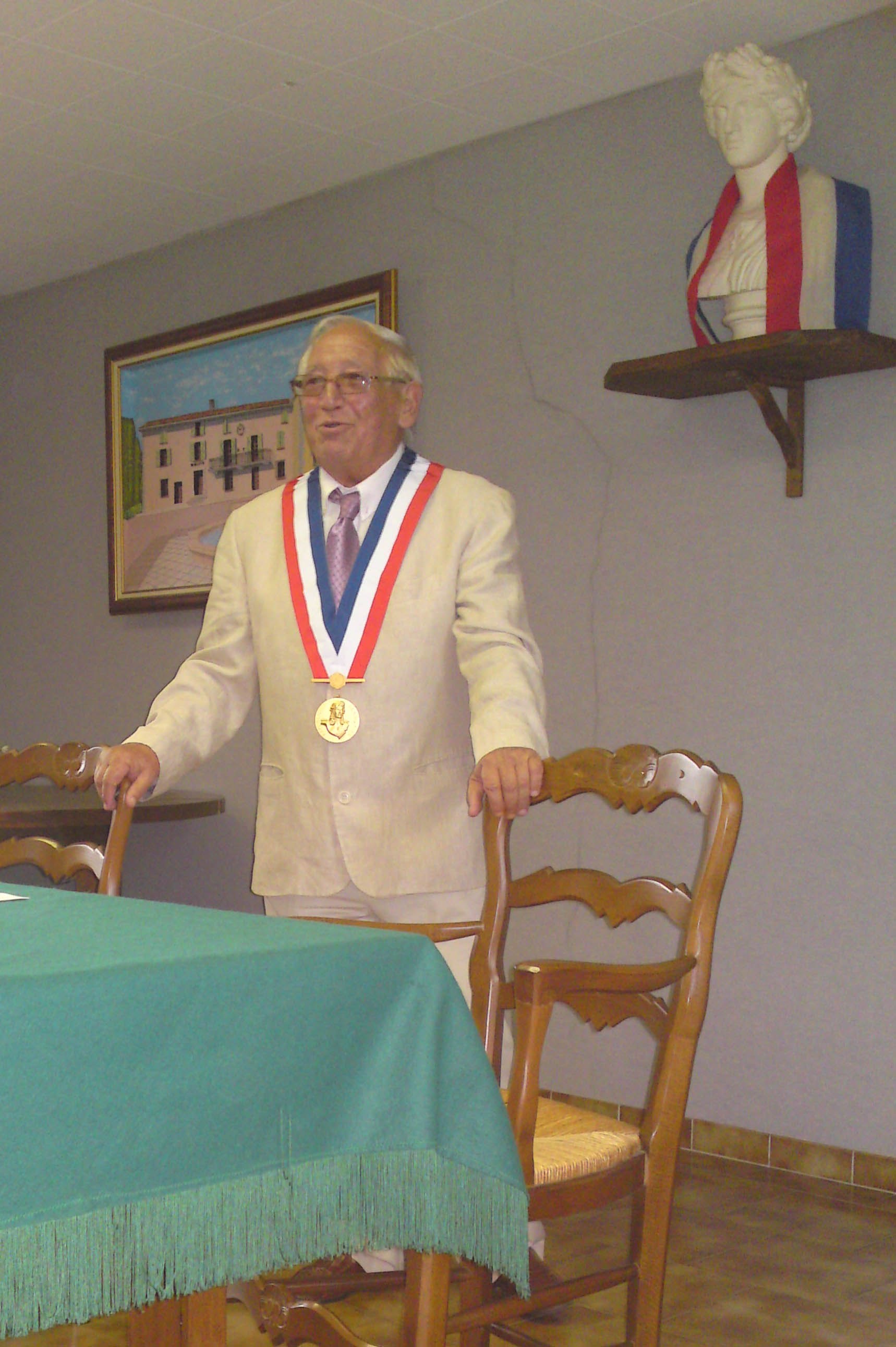 Gabriel Uvernet, maire du Thoronet, pris en photo à l'occasion du mariage de Christian Rhinan, le 11 juillet 2009